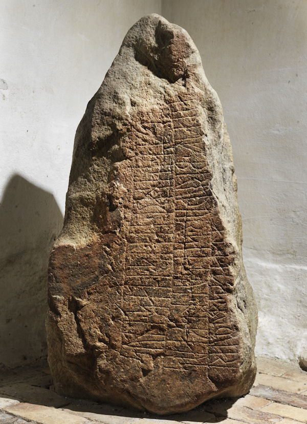 Rønninge-stenen. Foto: Nationalmuseet ved Roberto Fortuna